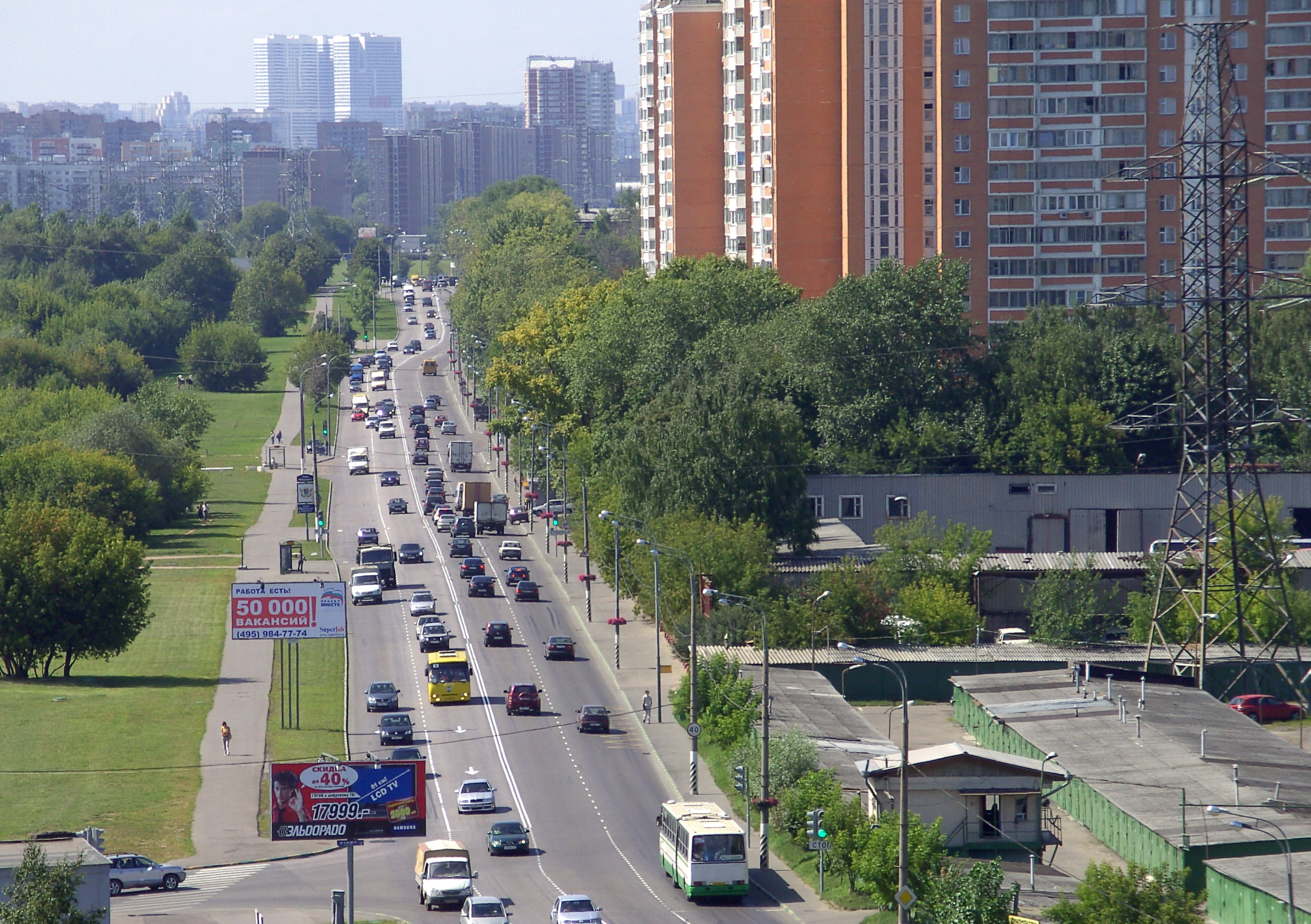 улица Борисовские Пруды в районах Москворечье-Сабурово и частично Братеево города Москвы.